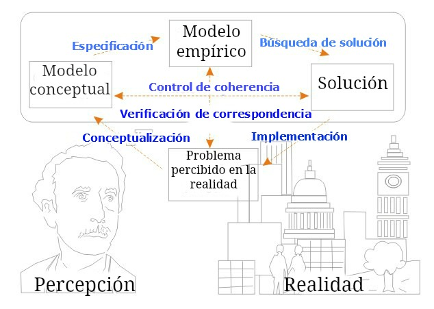 Esquema del proceso de resolución de problemas. Basado en Sol, HG (1984). "El papel emergente de simulación basado en la investigación de sistemas de apoyo a las decisiones". En: La productividad más allá: el desarrollo de sistemas de información para la eficacia de la organización. Th.M.A. Bemelmans (ed.). 1984.